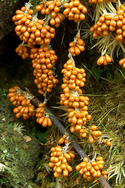 Leocarpus fragilis.